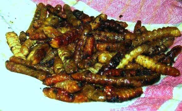 Zendette frit